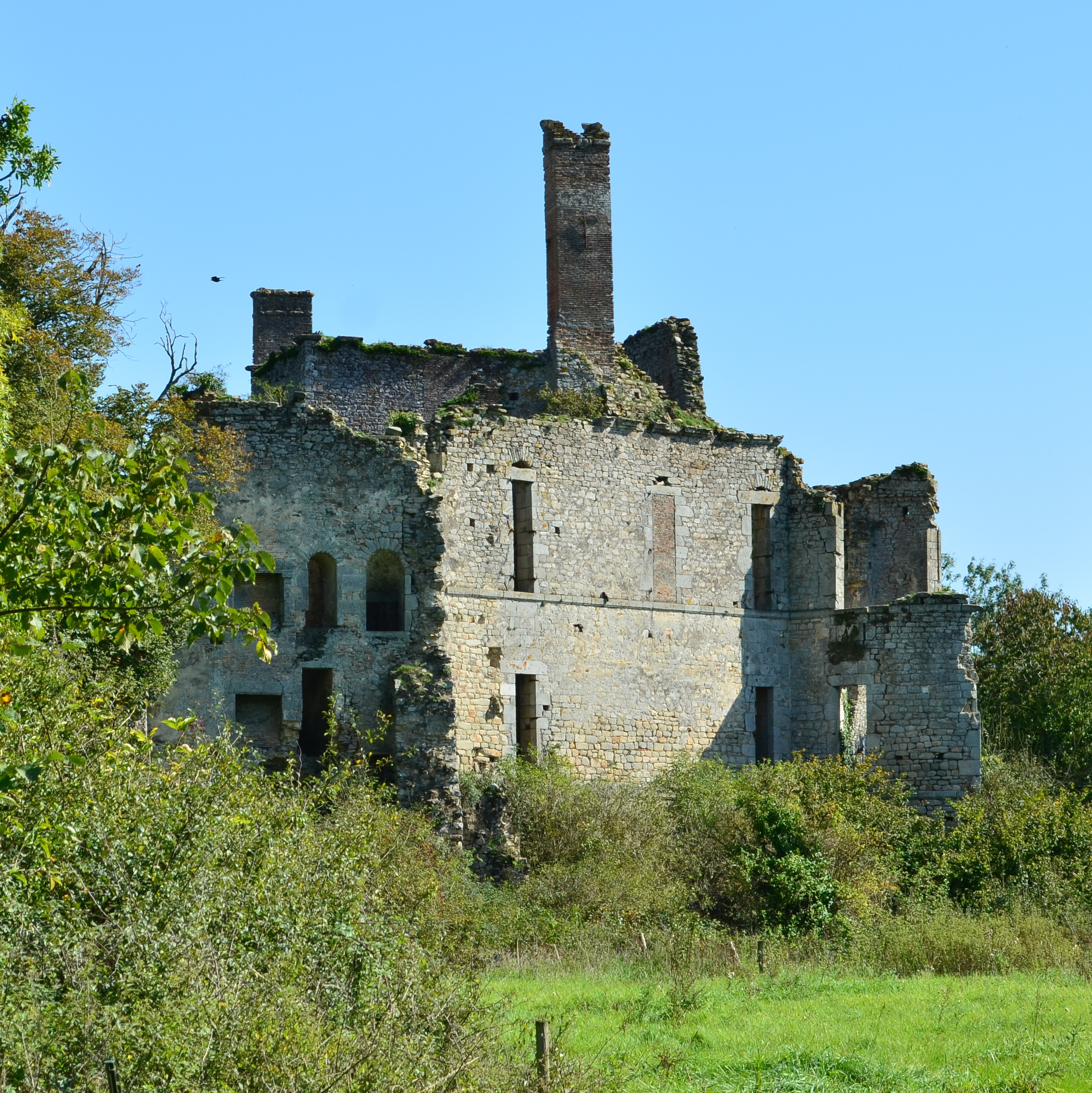 Aperçu du Château de Palluau depuis le parc de la ville .